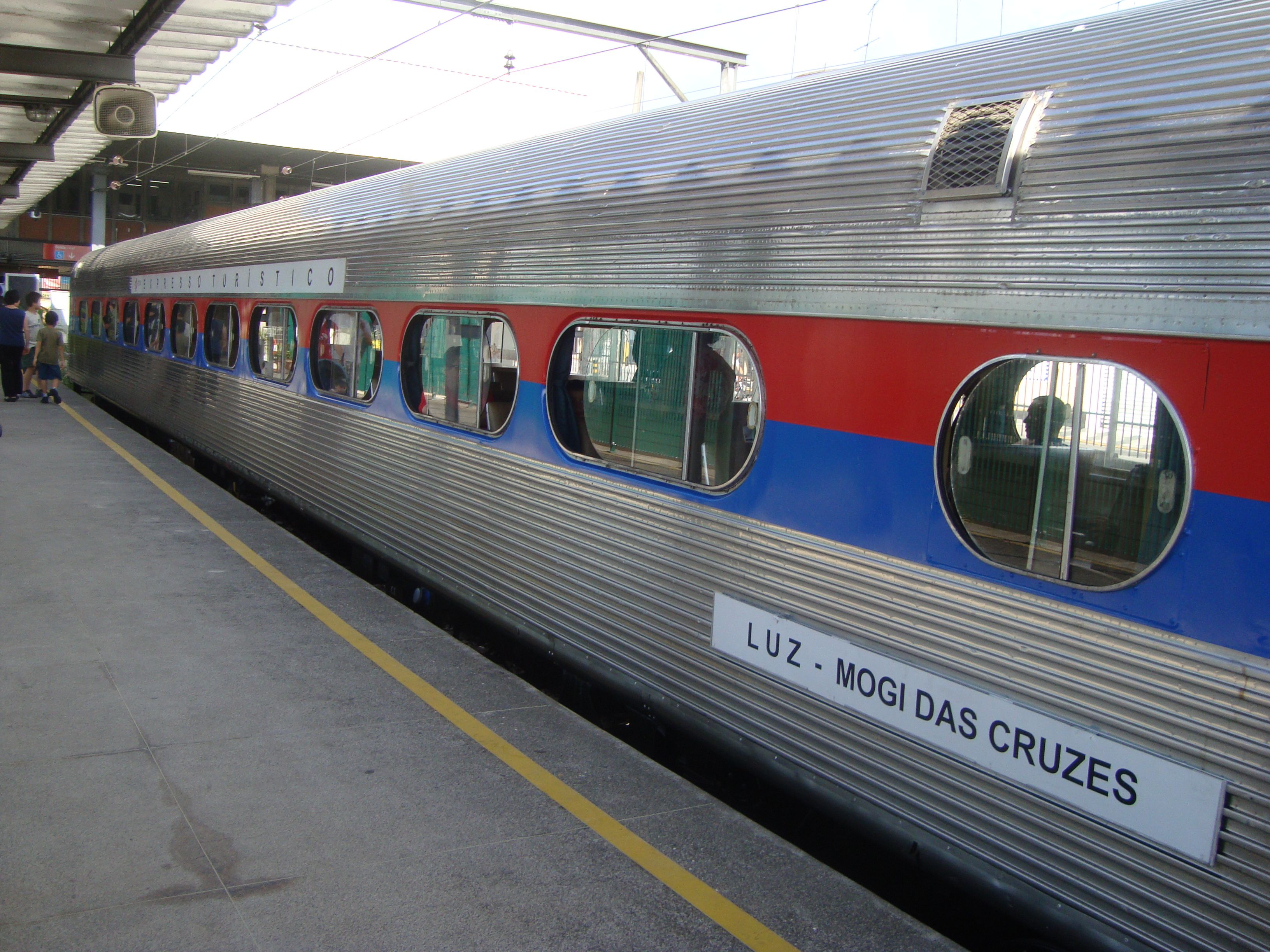 Foto de um vagão do Expresso Turístico em Mogi das Cruzes.